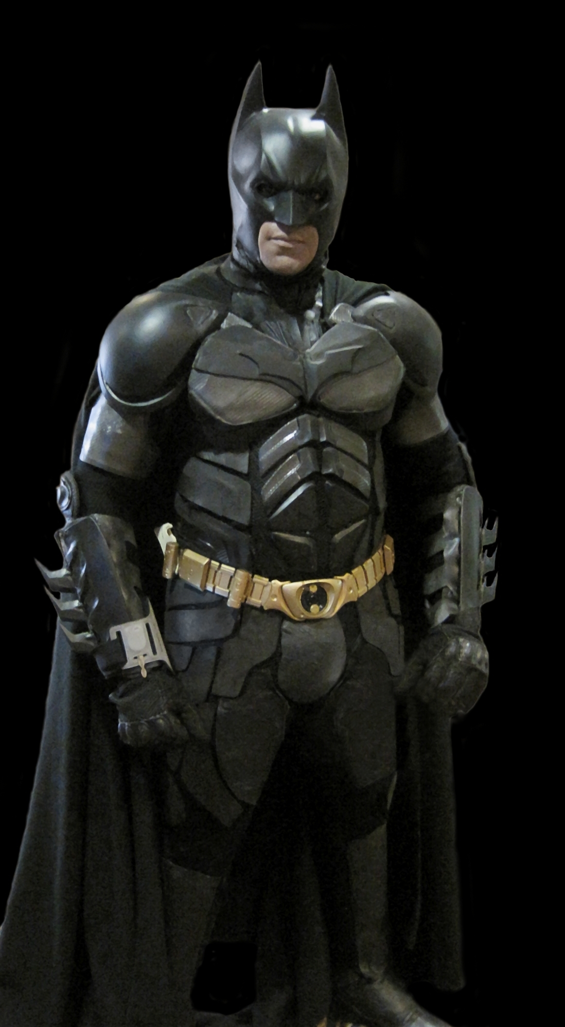 Batman Cosplay - Dragon Con 2012 (Saturday)